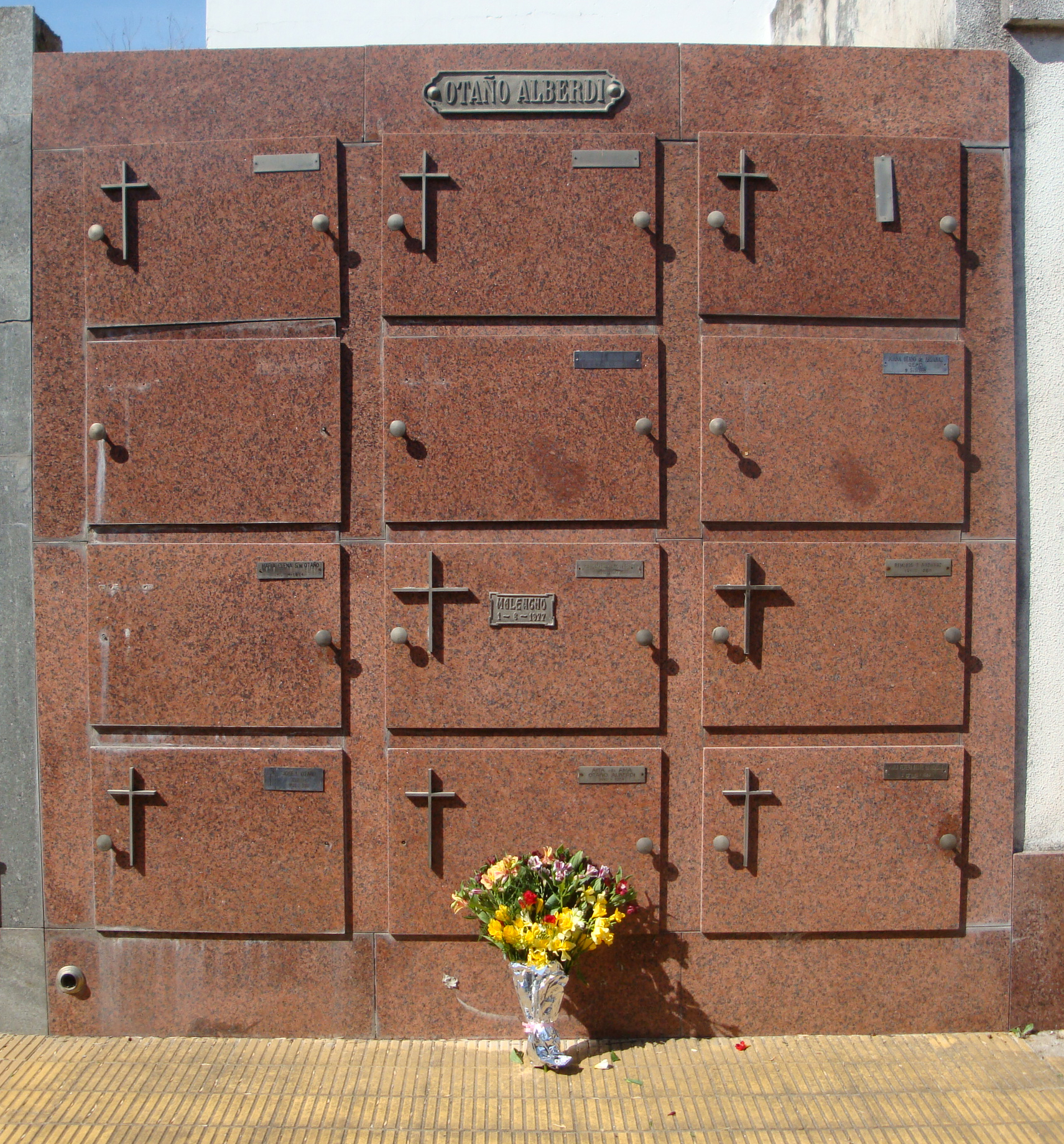 Pello Mari Otaño eta Malen emaztearen hilobia, familiako nitxarioan La Platako kanposantuan.